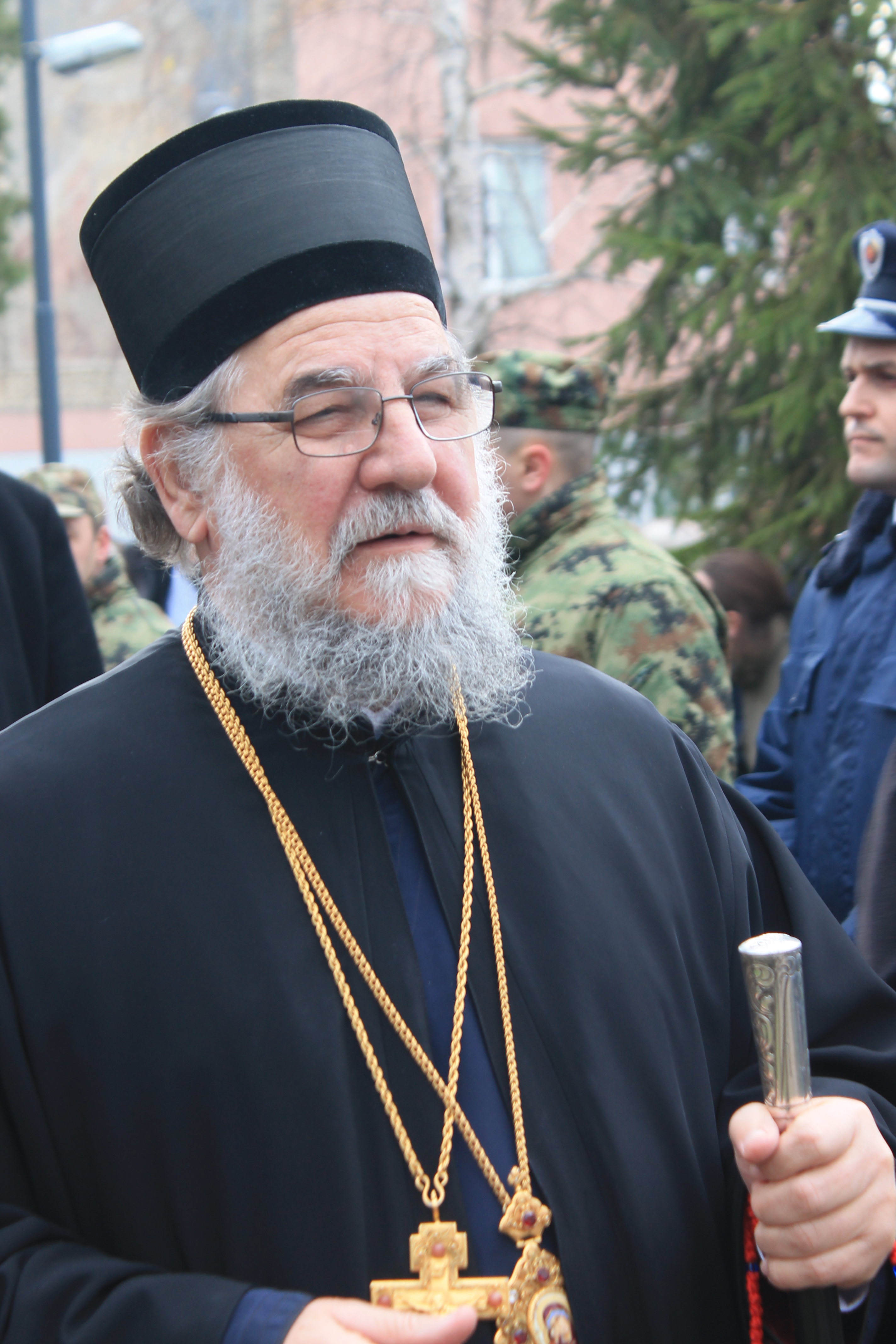 Bogojavljenje 2018, plivanje za časni krst Sremska Mitrovica